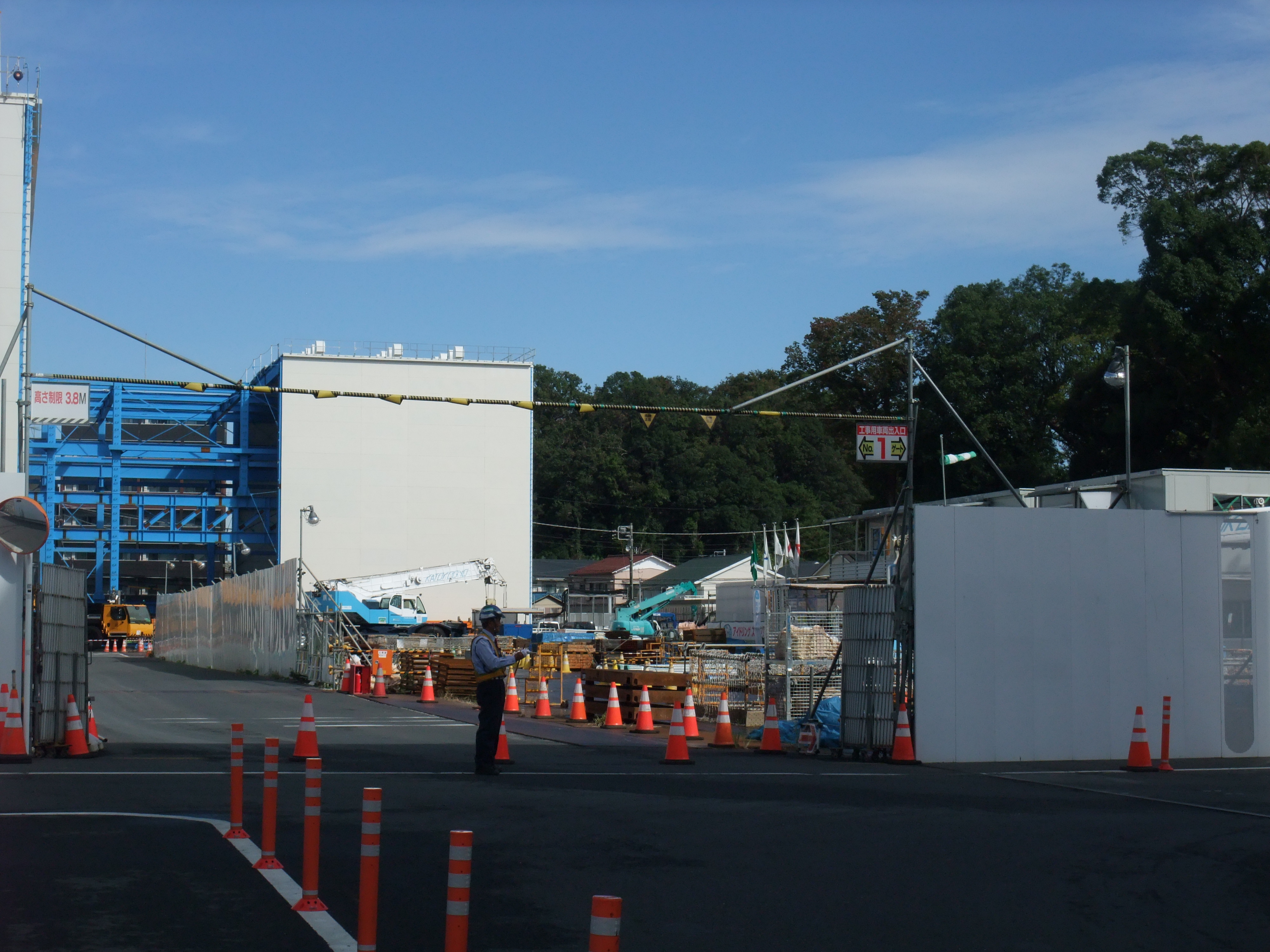 建設中の東急新横浜線新綱島駅（地上部分）